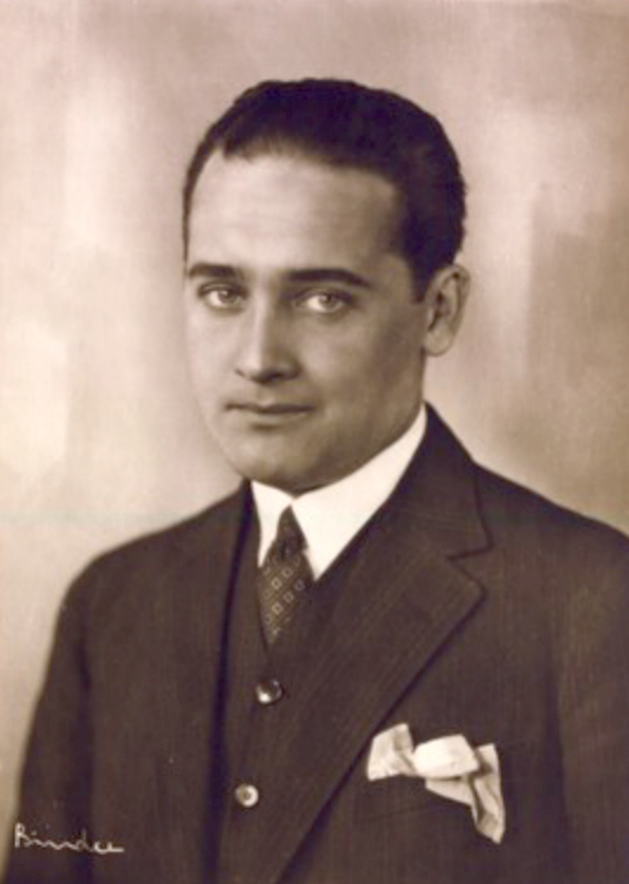 Max Hansen, eigentl. Max Haller, (* 22. Dezember 1897 in Mannheim; † 13. November 1961 in Kopenhagen), in Deutschland aufgewachsener deutschsprachiger Kabarettist, Filmschauspieler und Sänger dänischer Staatsangehörigkeit